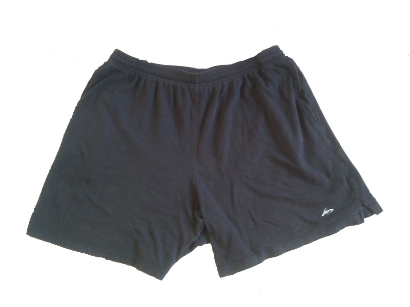 fotografia de una pantaloneta